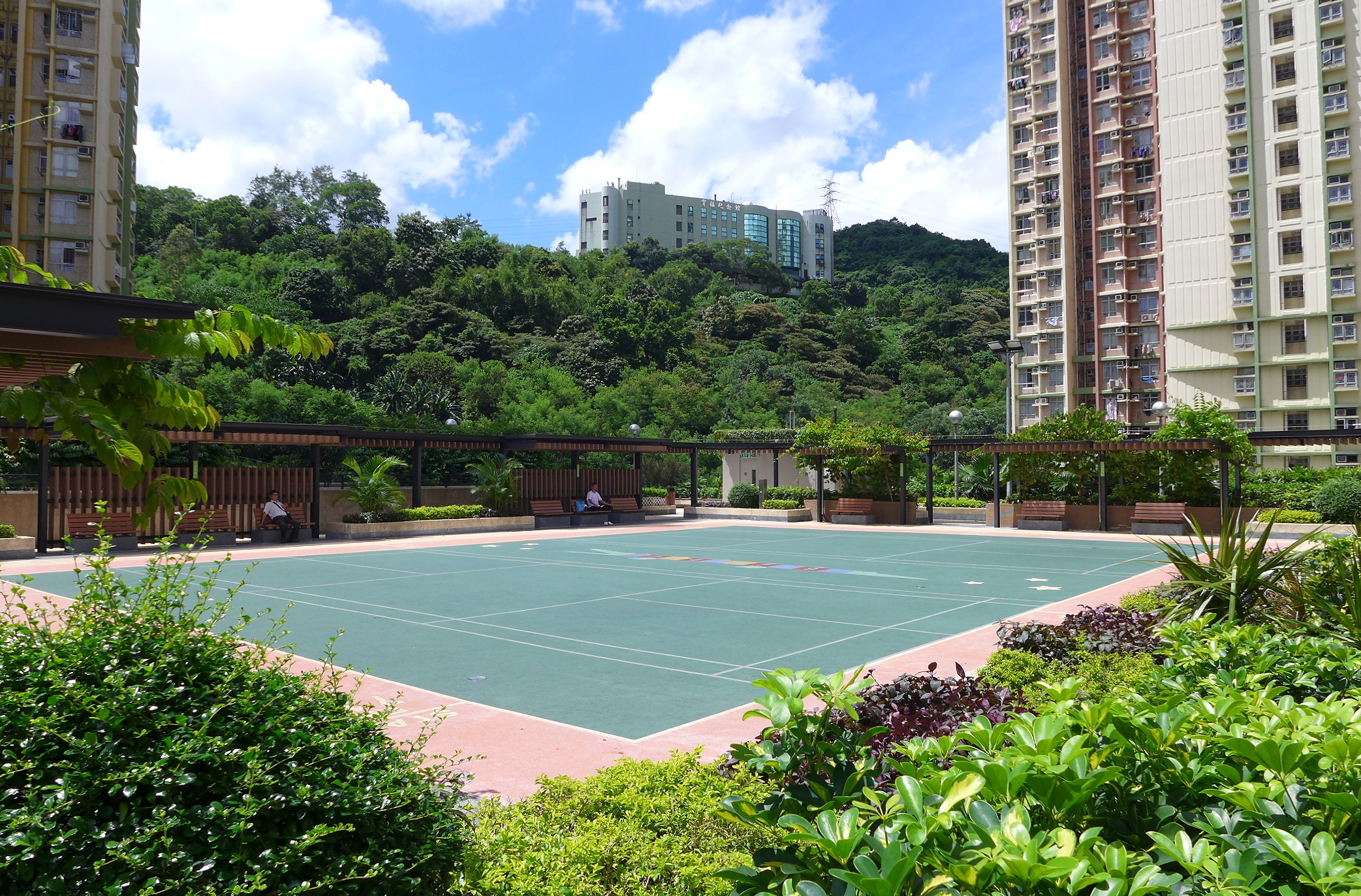 Mei Tin Estate Carpar Podium